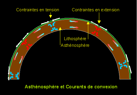 Asthénosphère et courants de convexion convection Activité interne de la Terre de la planète Terre